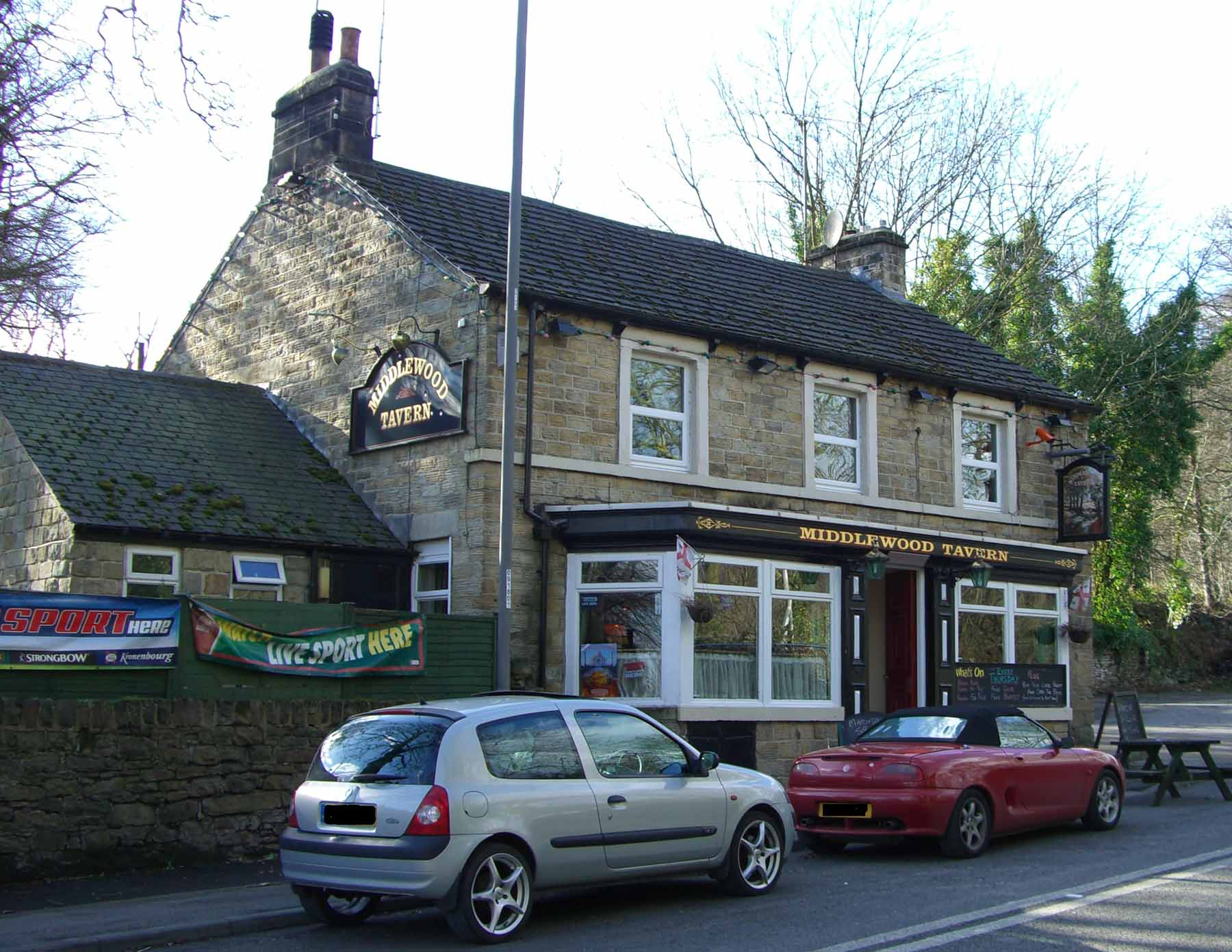 Middlewood Tavern